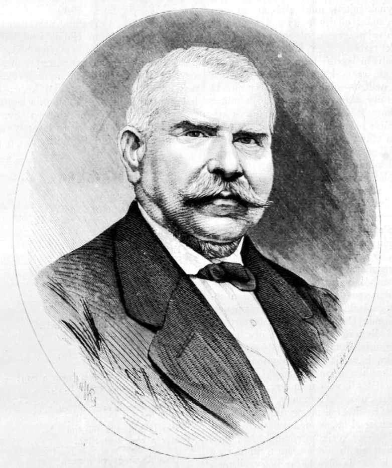 Toldy Ferenc (1805–1875) irodalomtörténész, egyetemi tanár, akadémikus és a Kisfaludy Társaság elnöke. Pollák Zsigmond metszete Haske rajza alapján